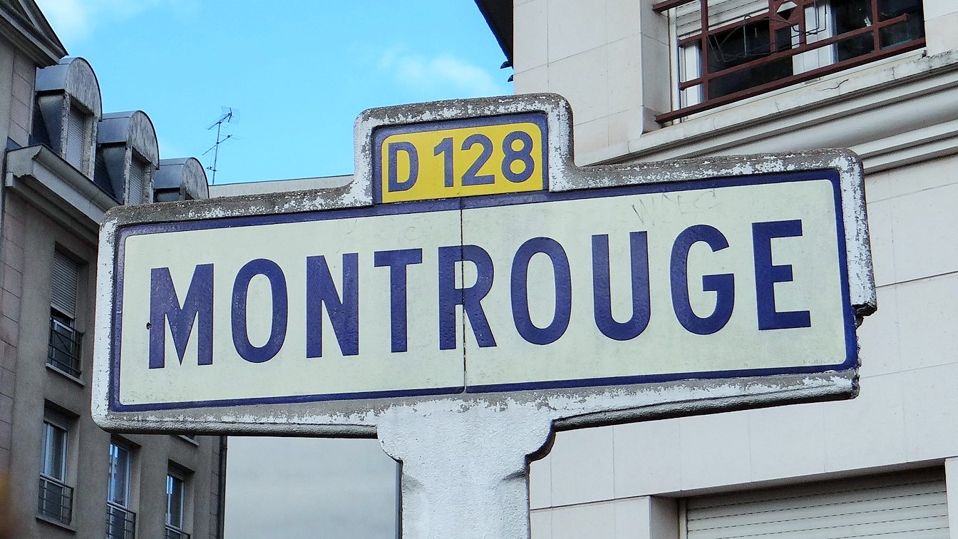 Ancien panneau d'entrée de ville à Montrouge rue Henri Ginoux en venant de Bagneux